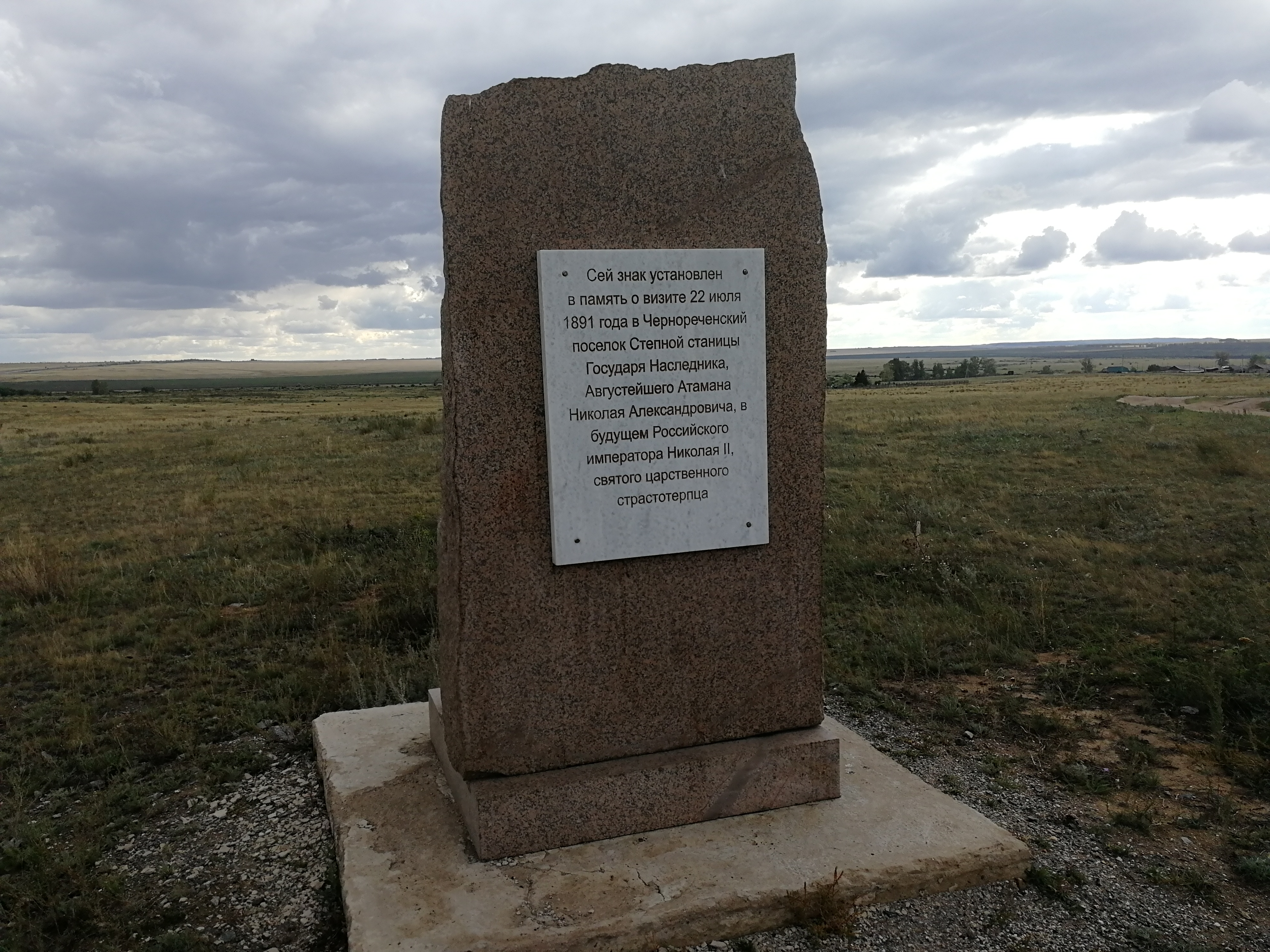 Памятный знак поселок Черноречье, где в 1891 году состоялась встреча наследника российского престола Николая Александровича с казаками и золотопромышленниками.